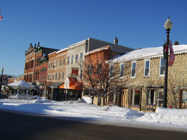 Warren - Main Street in Winter 2008